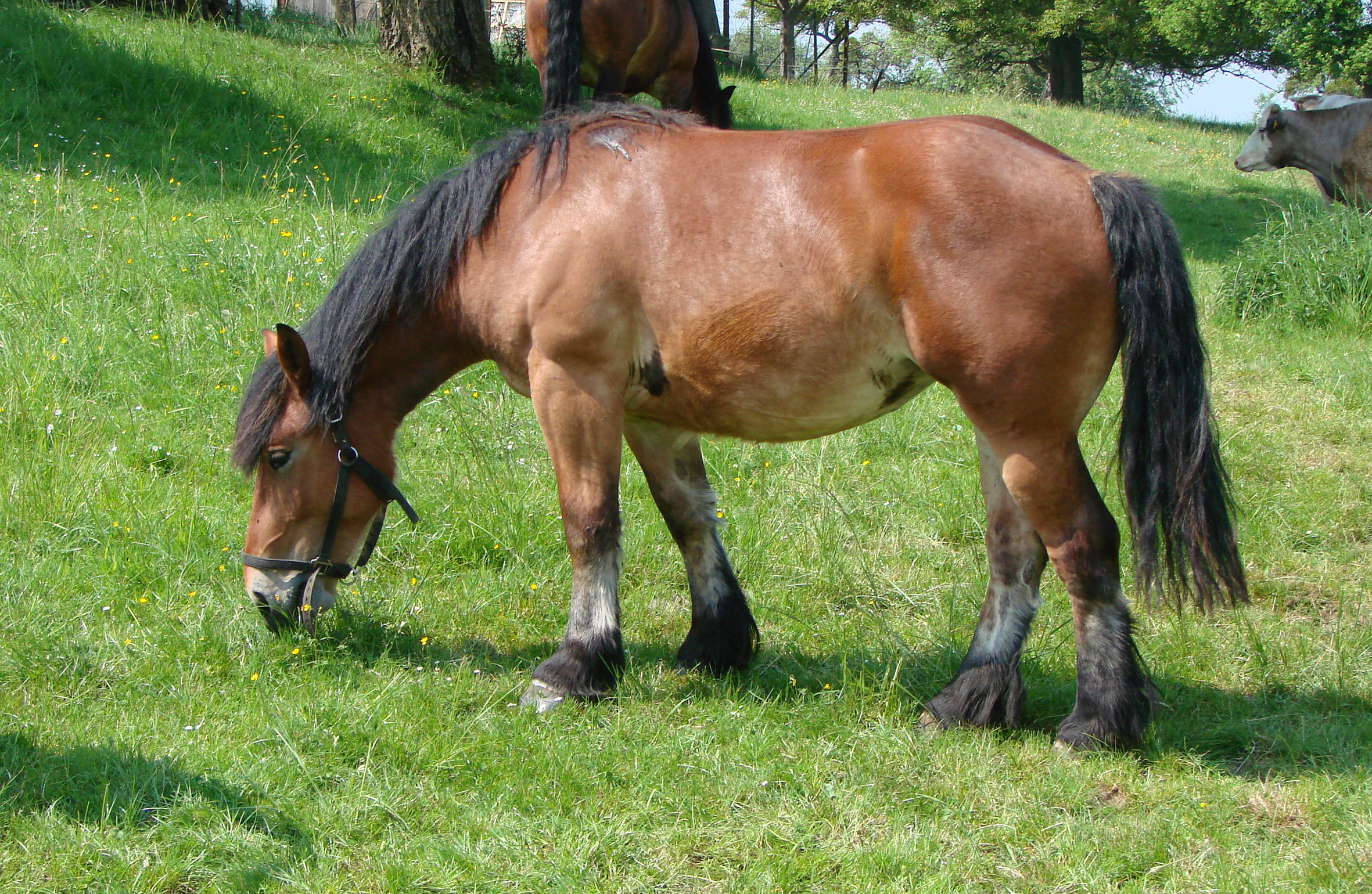 Jument de race ardennaise.